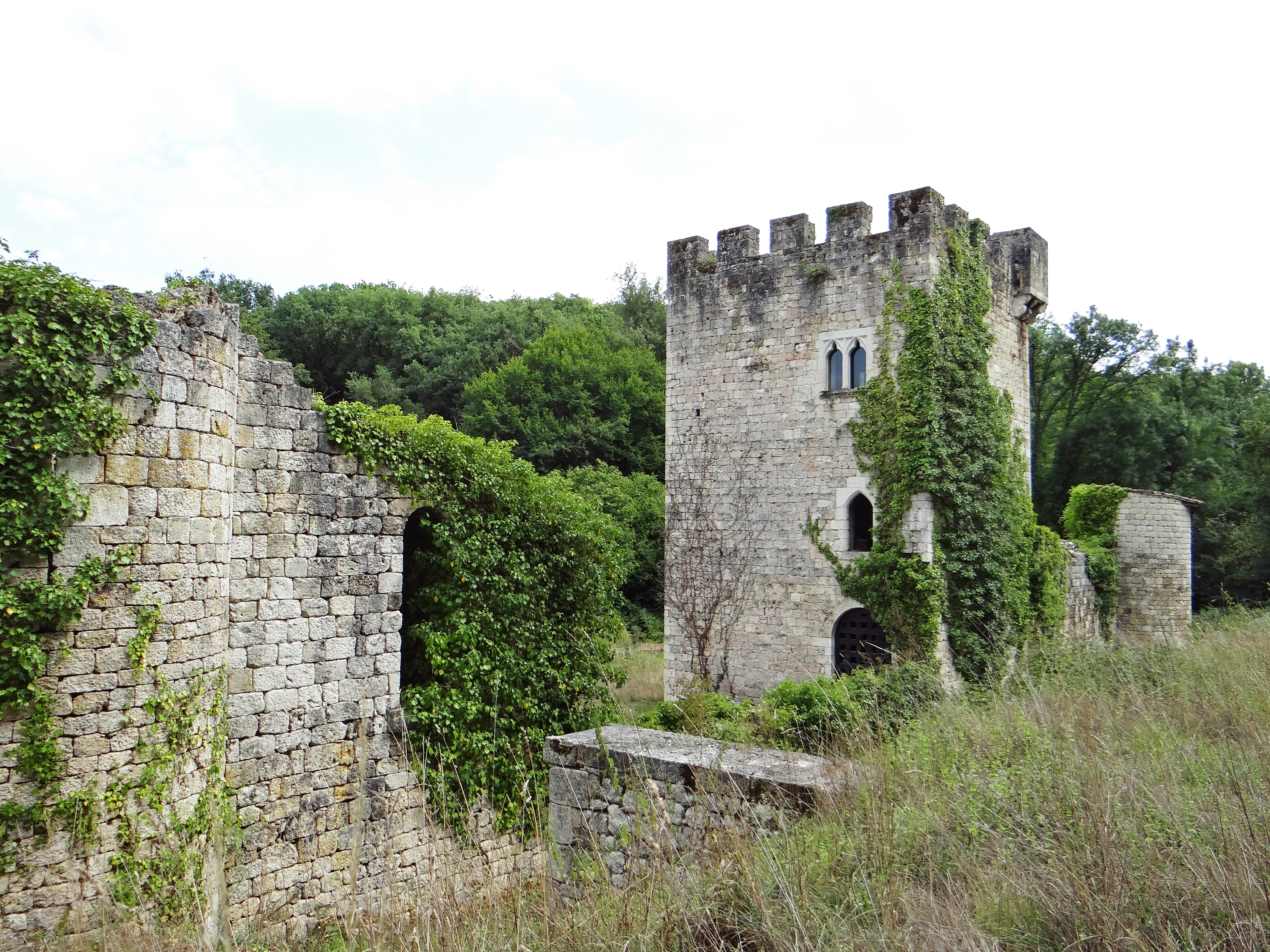 Castella (Lot-et-Garonne) - Château de Fontirou